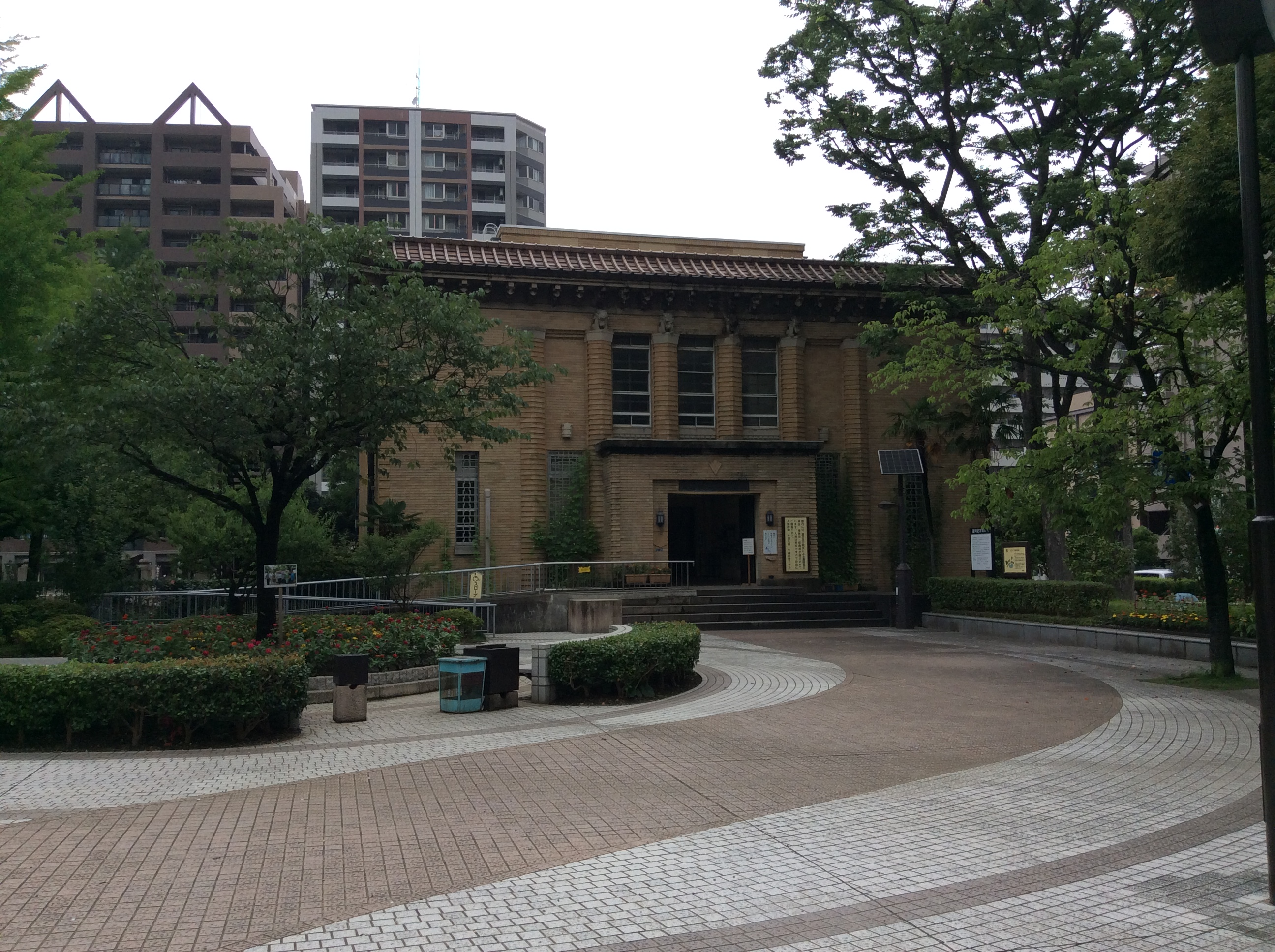 （2015年7月7日撮影）